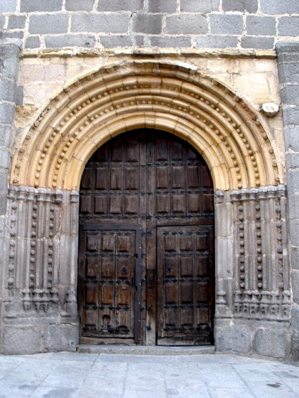 Church of San Juan Bautista, Ávila